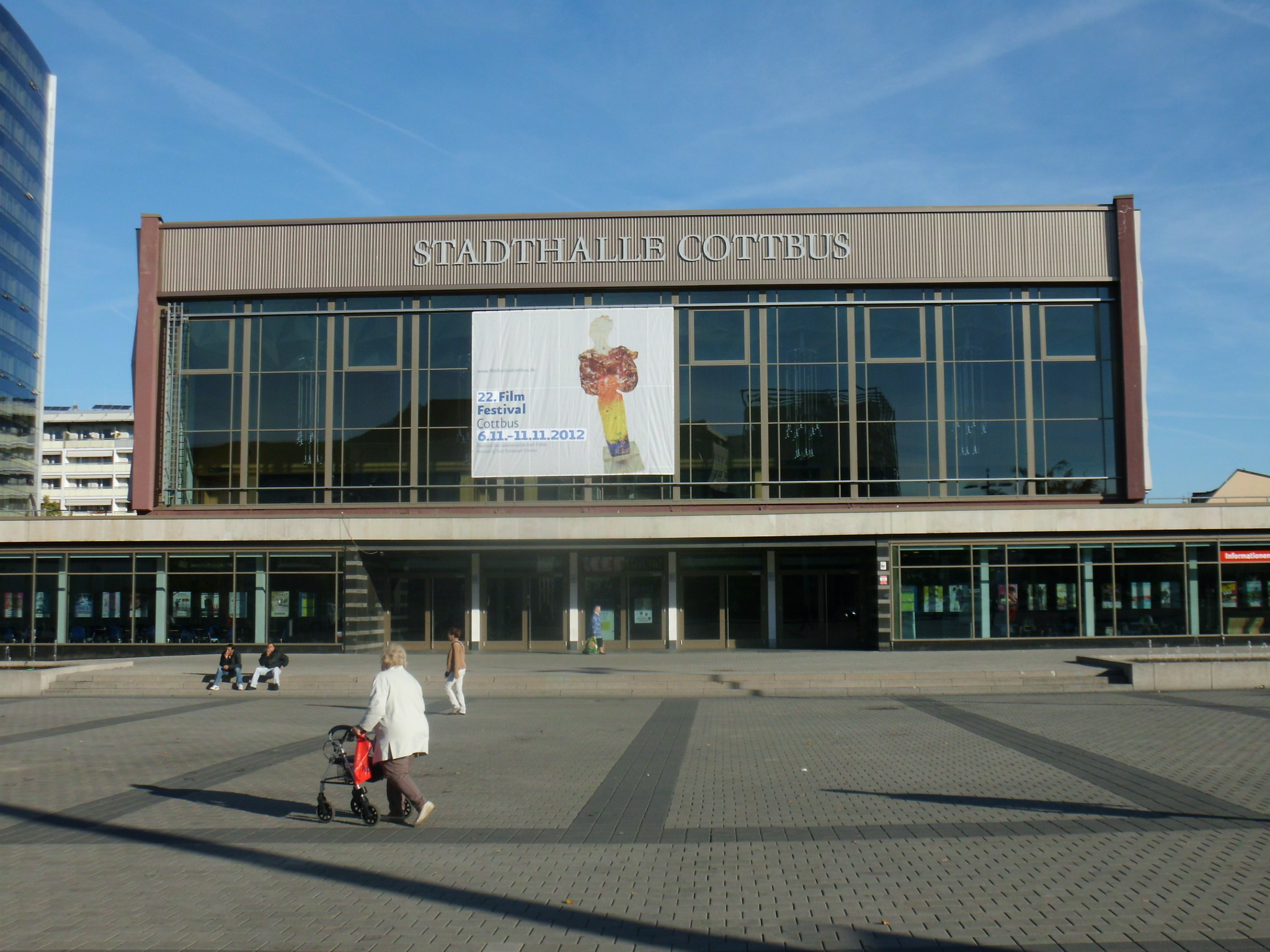 Stadthalle Cottbus (Berliner Platz 2012)